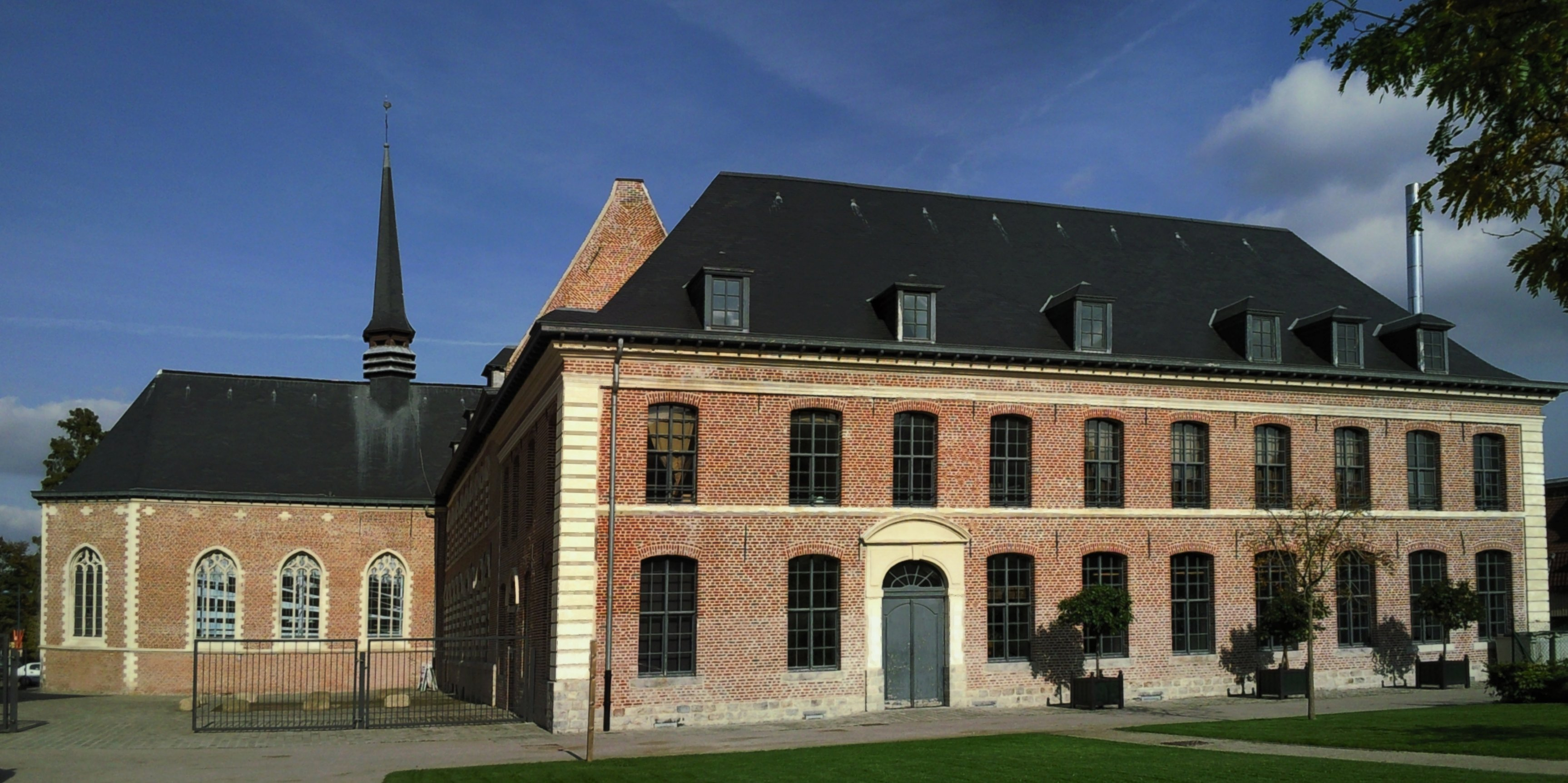 Le cloître et la chapelle de l'hospice d'Havré à Tourcoing (Nord). Fondé en 1260, la gestion de l'hospice est confiée aux Sœurs Grises de l’ordre de Saint-François de Comines en 1630. Le cloître s’élève à partir de 1631 et la chapelle sera construite entre 1644 et 1656. En 1998, l’hospice est fermé et la ville acquiert l’ensemble du site l'année suivante. Il fera l'objet d'une réhabilitation dans le cadre du projet Lille 2004, Capitale européenne de la culture. Baptisé Maison –Folie de Tourcoing, c'est à présent un « lieu d’art et d’échanges » qui accueille des spectacles et des expositions.